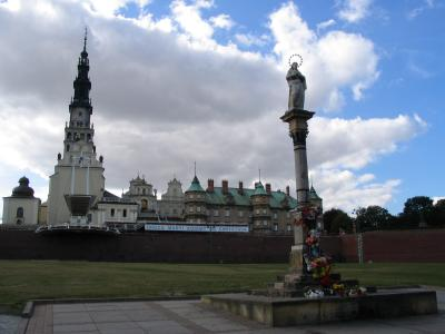 Description Czestochowa, septembre 2004. Sanctuaire de Jasna Gora Auteur (WT-fr) David Le Brun Licence Domaine public